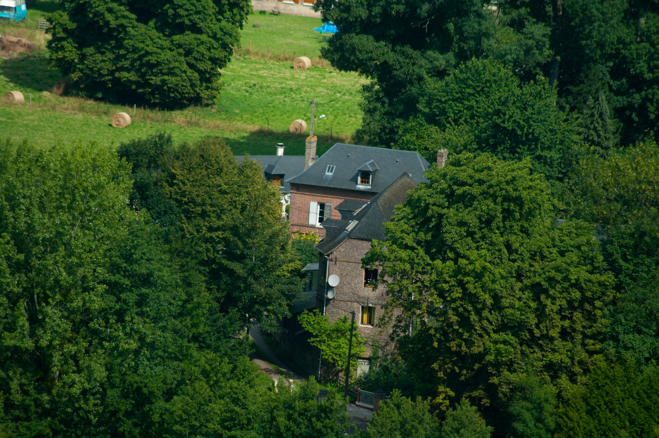 Photographie du moulin depuis la colline des Deux-Amants